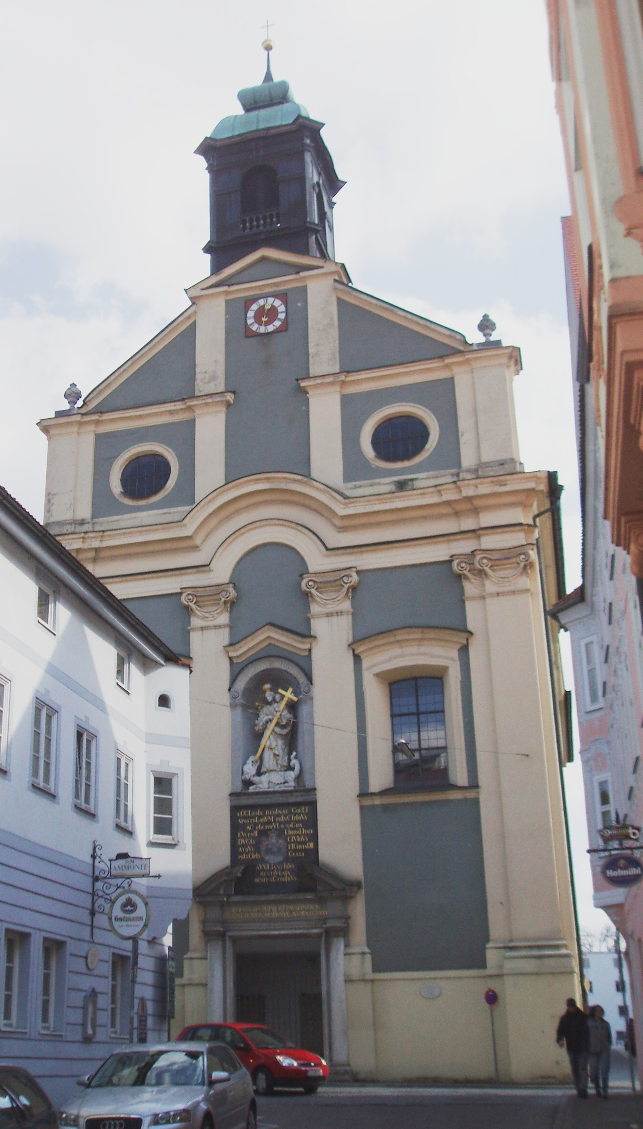 Dominikanerkirche_Eichstätt_heute (Fassade 1975 wiederhergestellt)